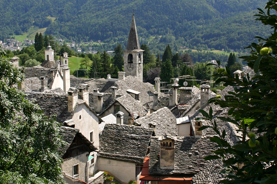 Scorcio del paese di Craveggia, vista sui tetti.